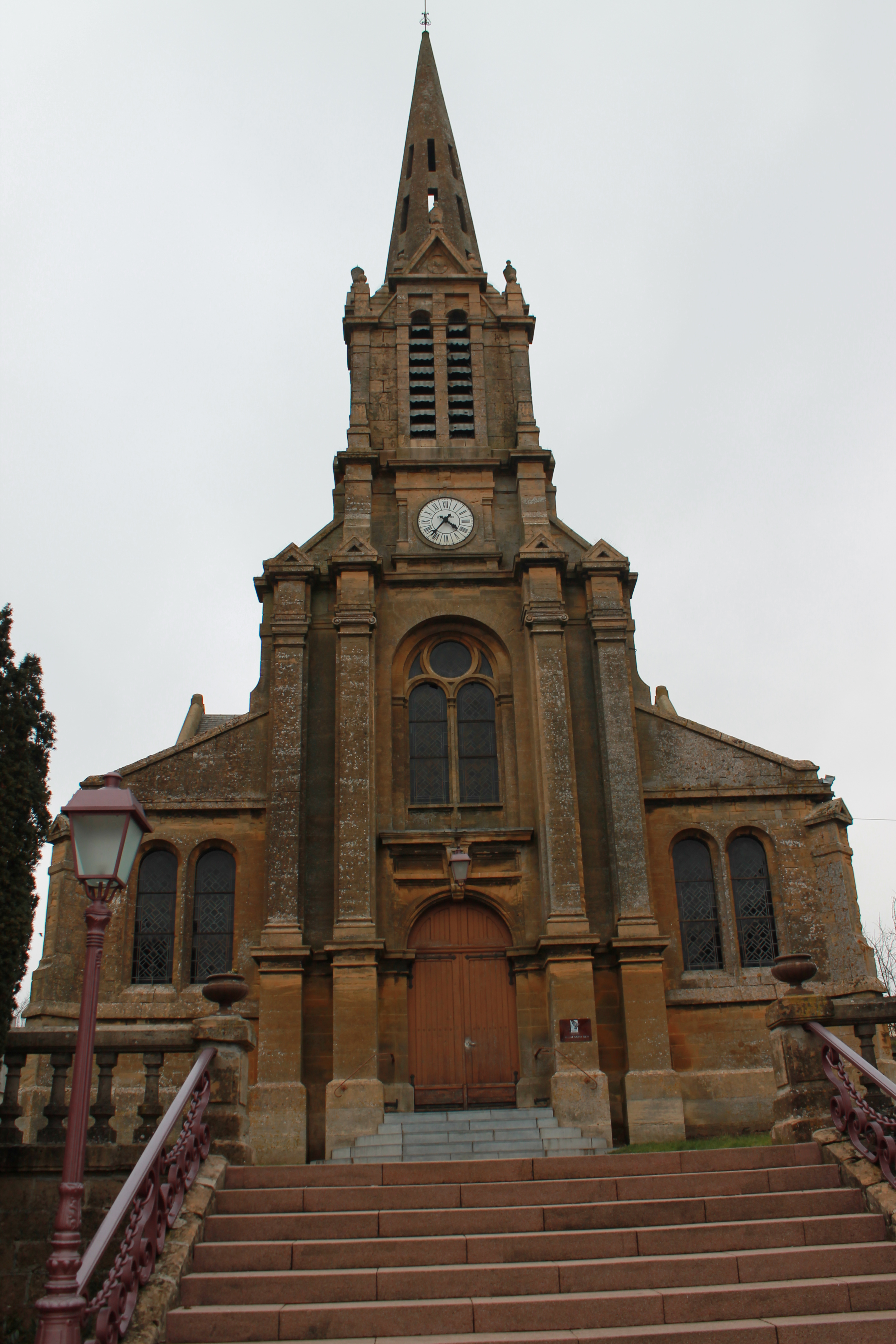 Eglise Saint-Rémy, à Flize.